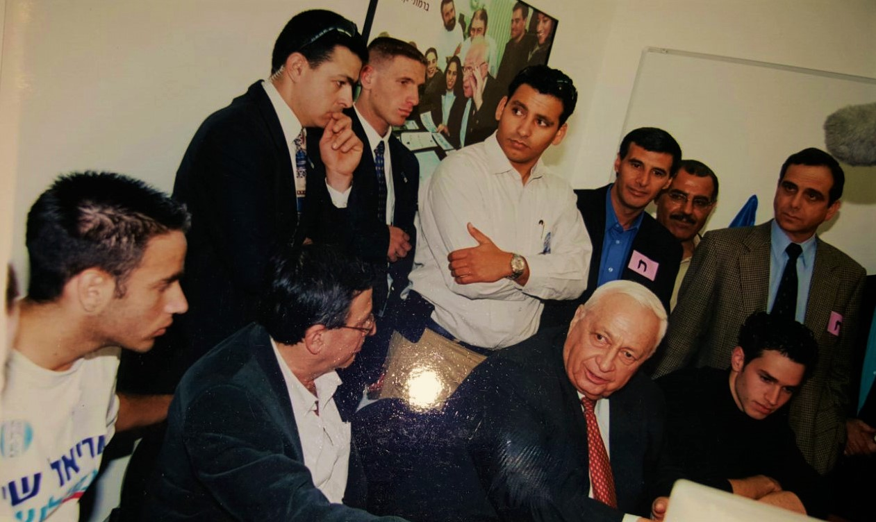 יואל חסון בעת ששימש יועץ לראש הממשלה אריאל שרון.